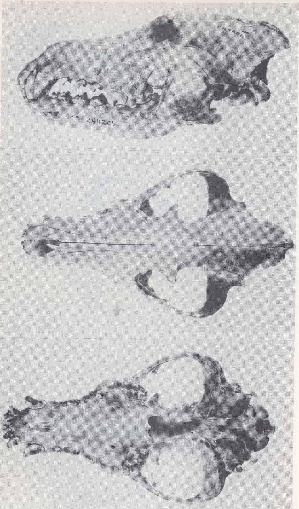 Gray wolf skull.